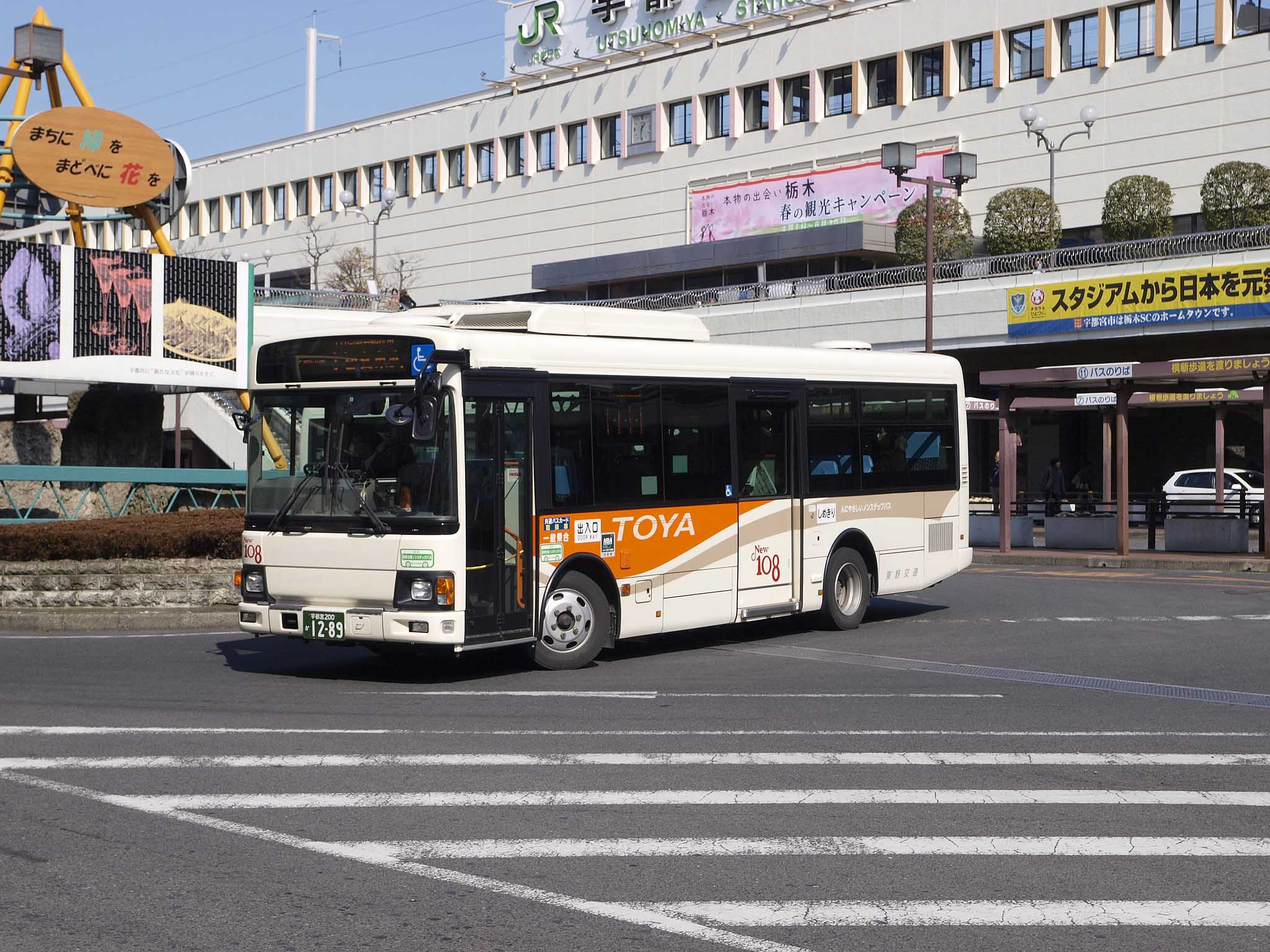 東野交通の日野・レインボーIIノンステップ車。現行路線バスのカラーリングは東武グループ観光色に準じているが、グラデーションがオレンジに変更されている。 型式：SKG-KR290J1（排ガス規制記号は推測） 登録番号：宇都宮200か1289 撮影地：栃木県宇都宮市、JR宇都宮駅西口